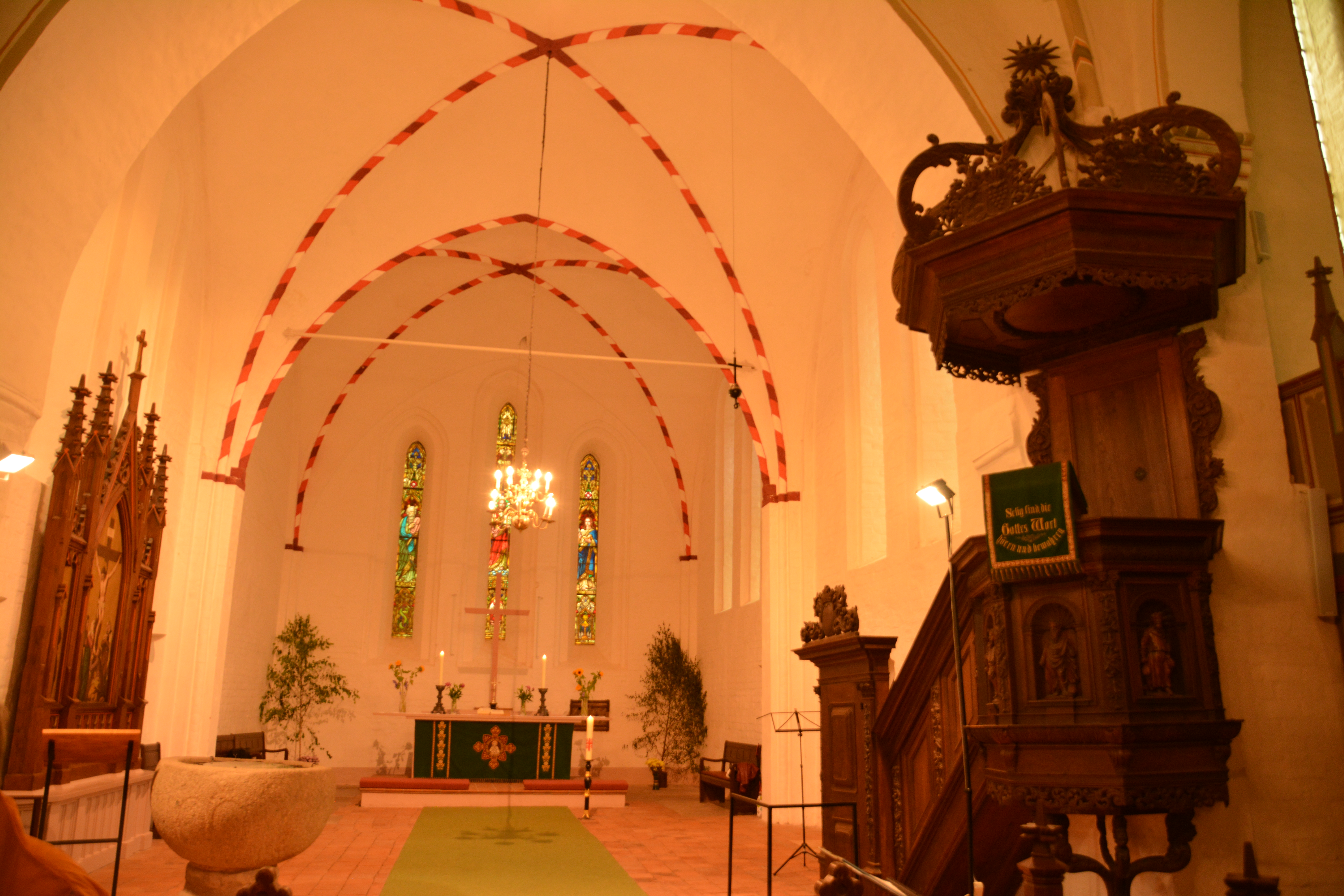 Stadtkirche Neubukow, Blick nach Osten